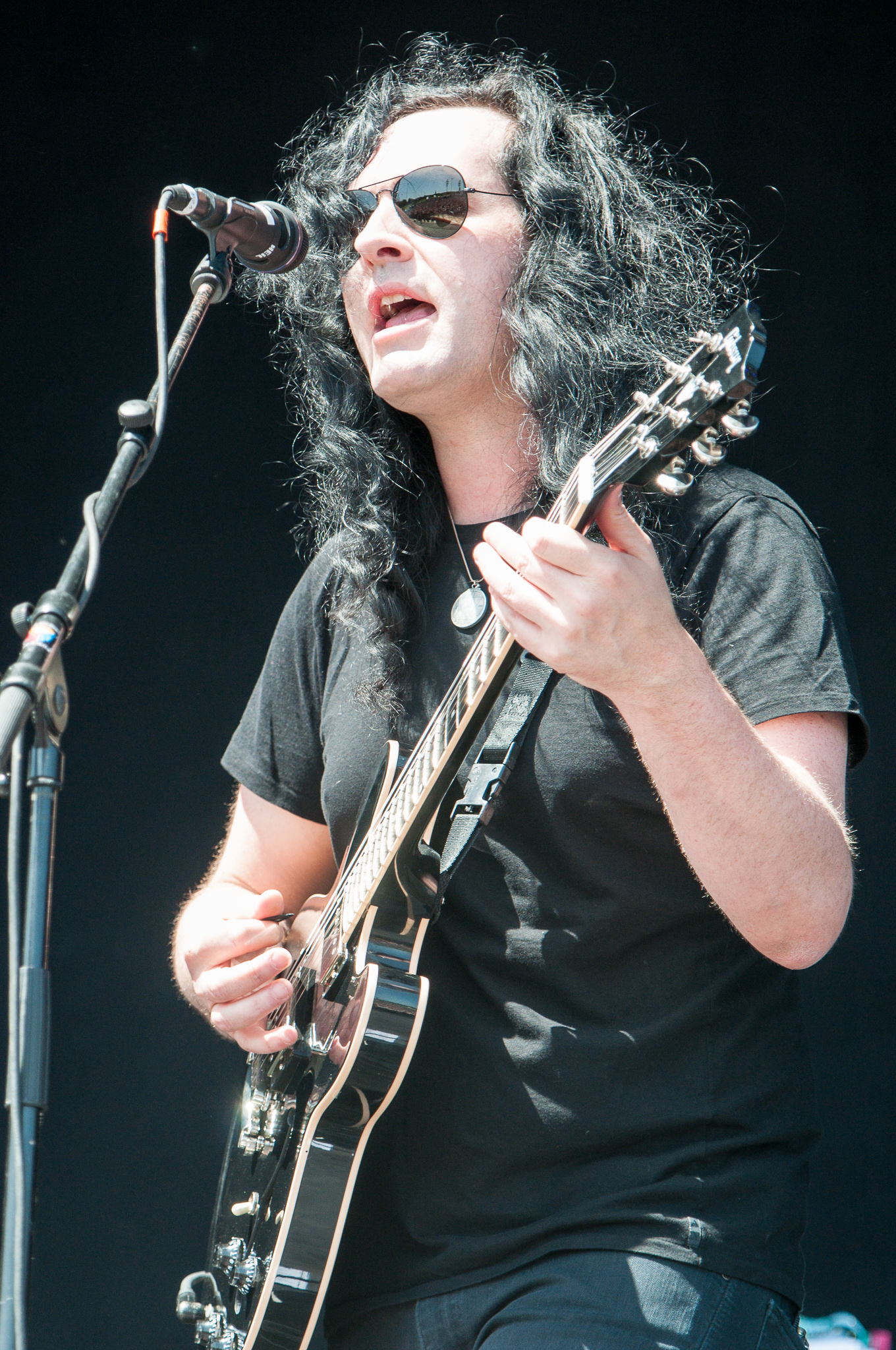 ARGO-Konzerte,Ben Philips,Centerstage,Konzert,Livekonzert,Livemusik,Musik,RiP,Rock im Park 2014,The Pretty Reckless